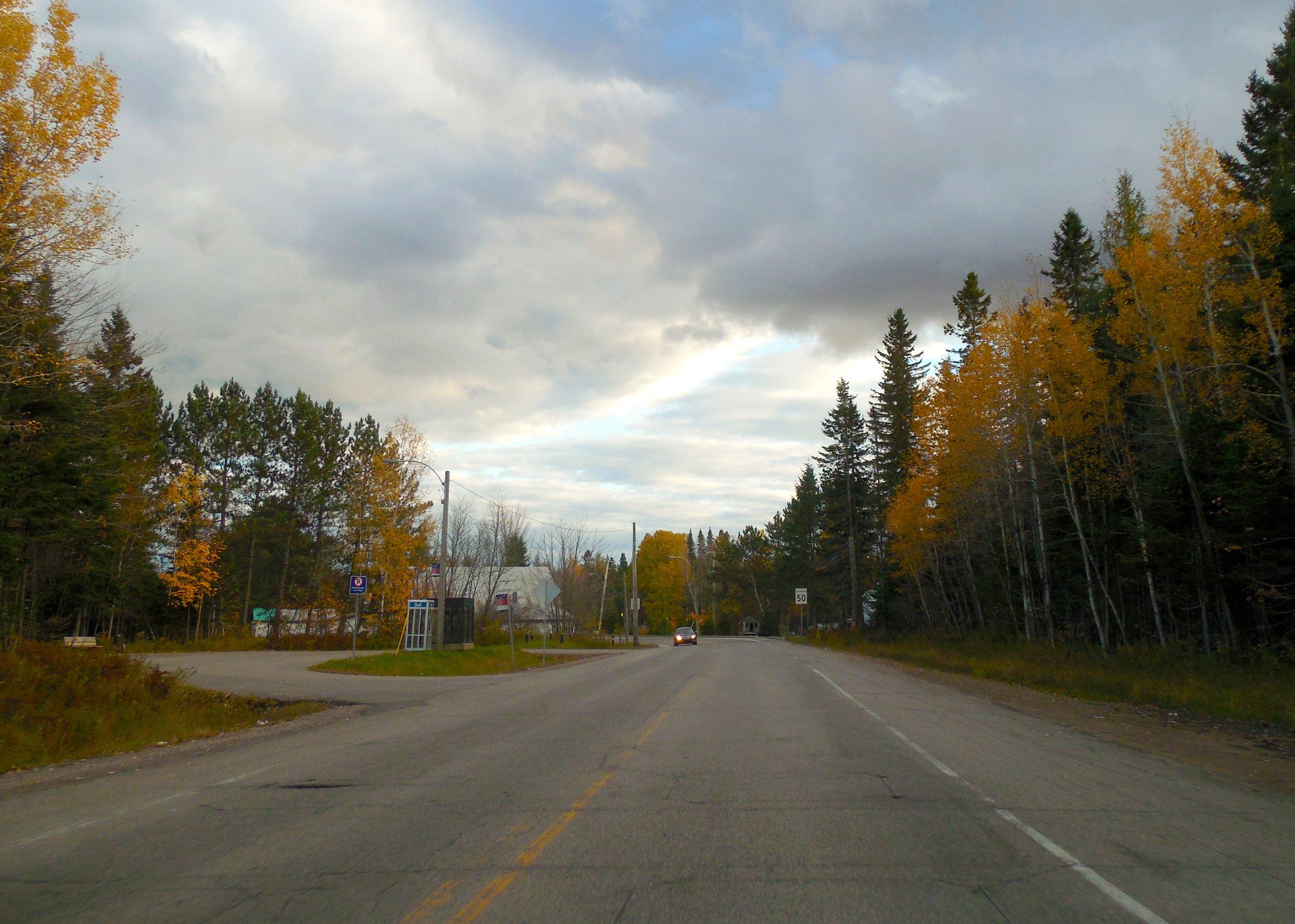 Route 369, au Québec.